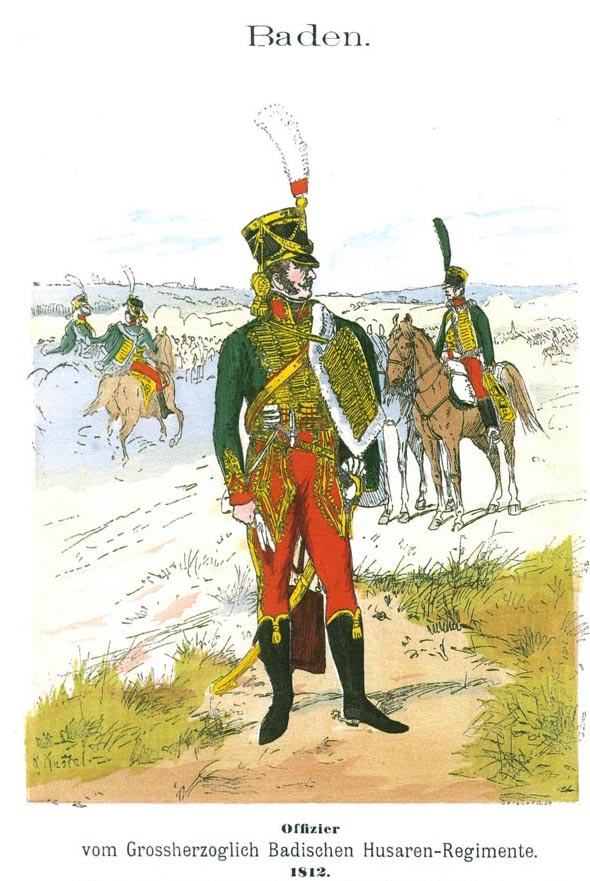 Badischer Husar